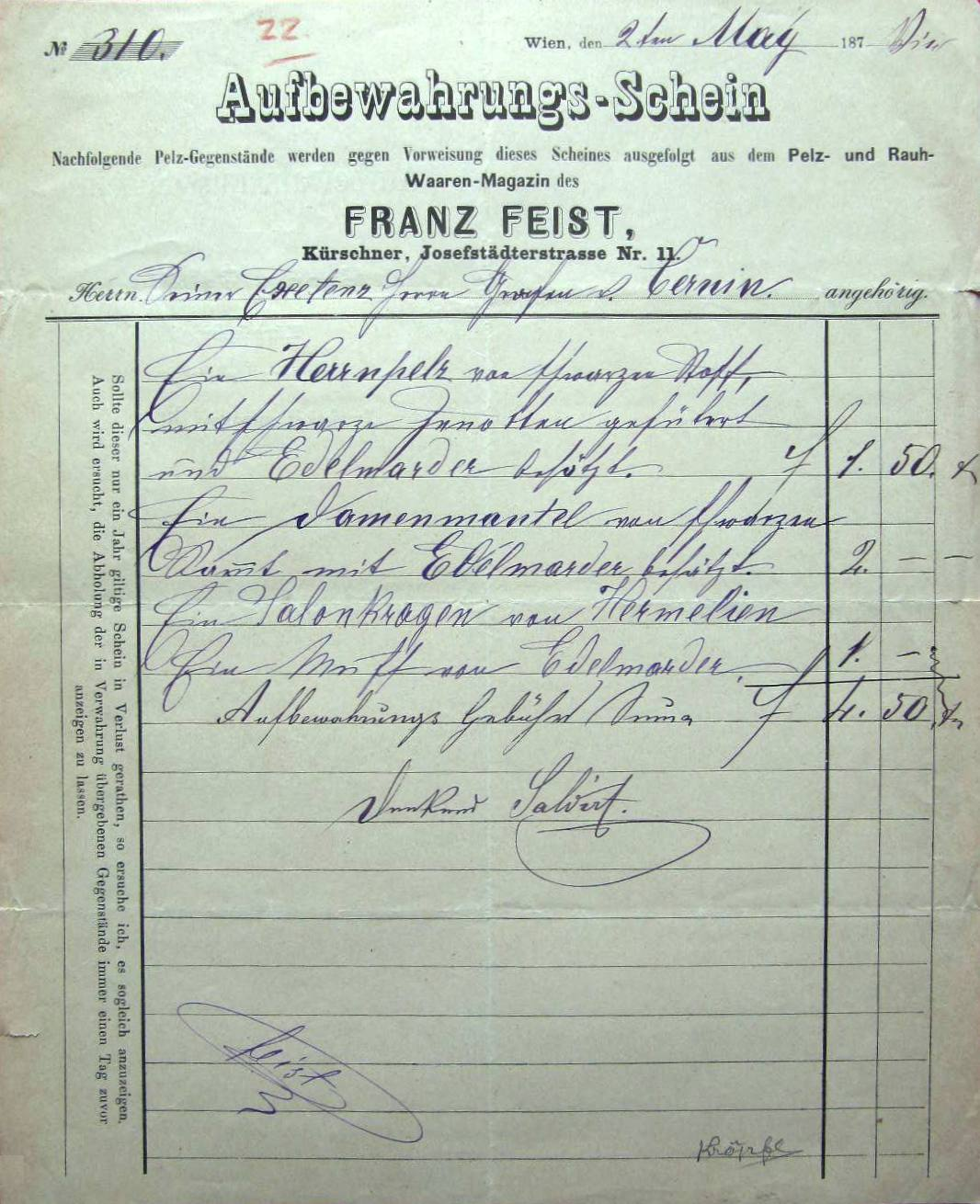 Franz Feist, Kürschner in Wien, Pelz-Aufbewahrungsschein Nr. 310 vom 2. Mai 1874. Josephstädterstrasse Nr. 11 Nachfolgende Gegenstände werden gegen Vorweisung dieses Scheines ausgefolgt aus dem Pelz- und Rauh-Waaren-Magazin des Franz Feist, Kürschner, Josephstädterstrasse Nr. 11 Herrn Seiner Exelenz Herrn Grafen v. Cernin. angehörig. Ein Herrnpelz von schwarzen Stoff, mit schwarze Zeno blau gefütert und Edelmarder besätzt. S. 50 Ein Danmenmantel von schwarzen Sammt mit Edelmarder besetzt. 2,- Ein Salonkragen von Hermelien Ein Muff von Edelmarder 1,- Aufbewahrungsgebühr summa S. 4,50 Dankend salvirt.